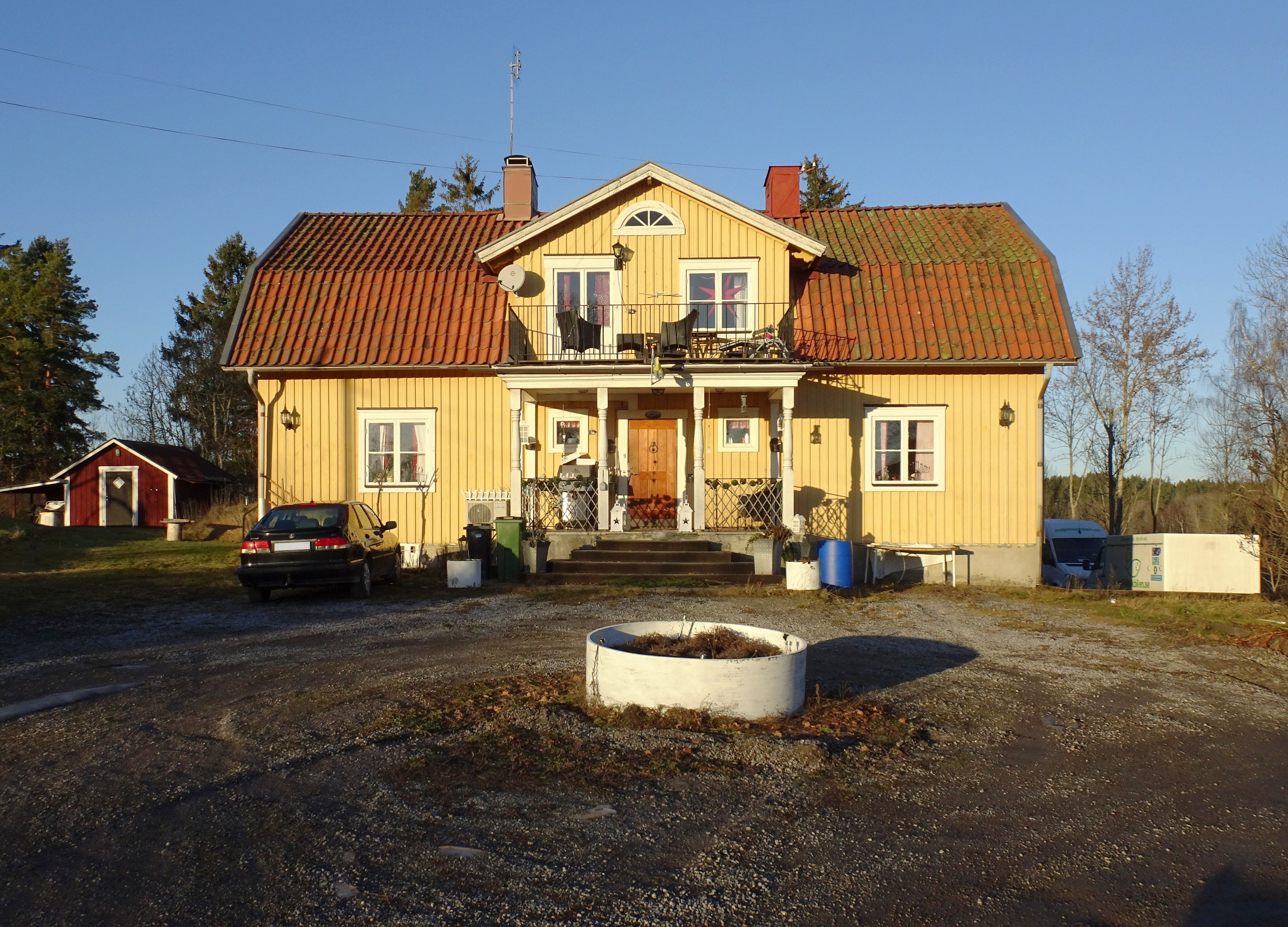 Hallinge gård, Salems socken (huvudbyggnad)